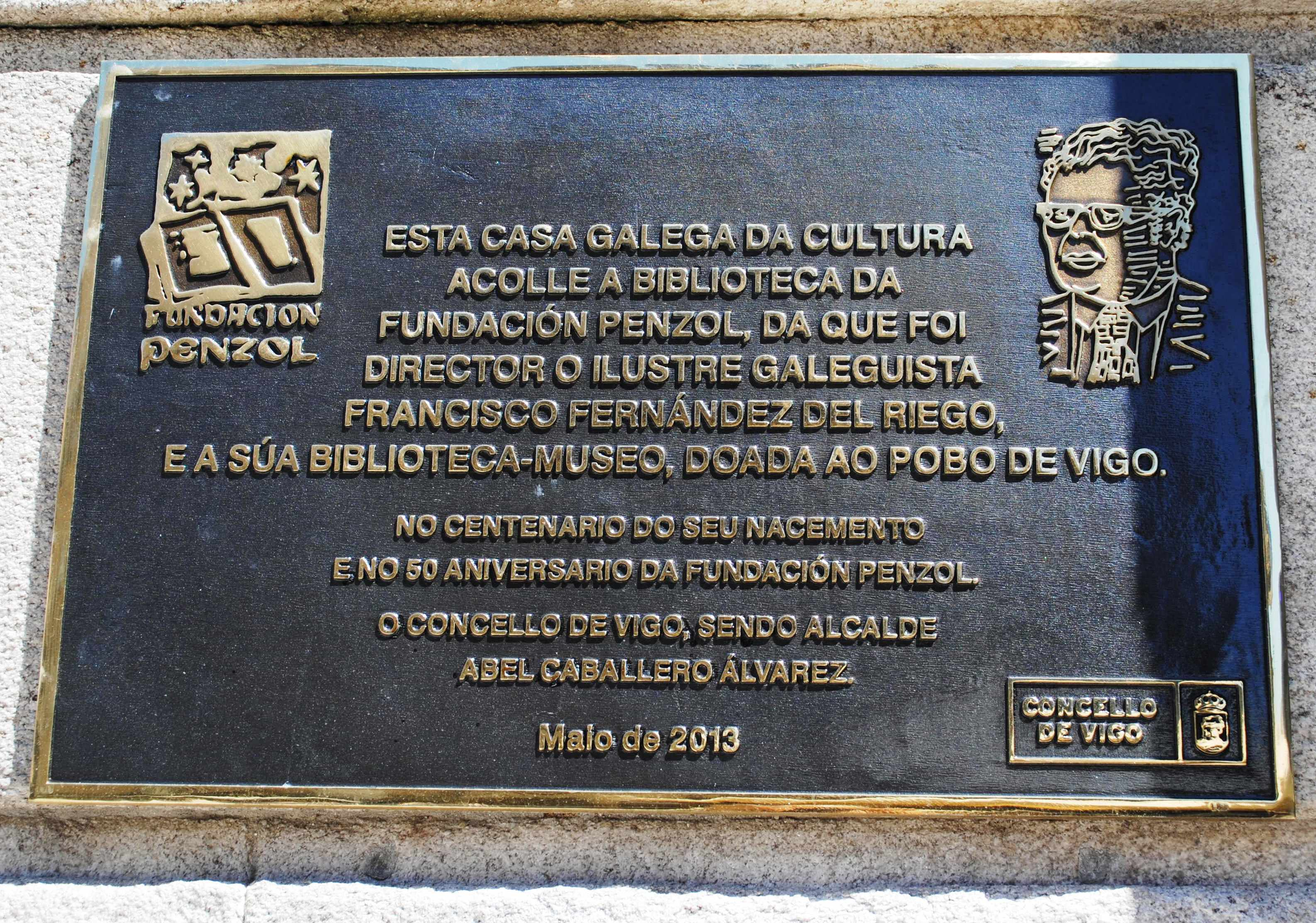 Vexa o título e as categorías.